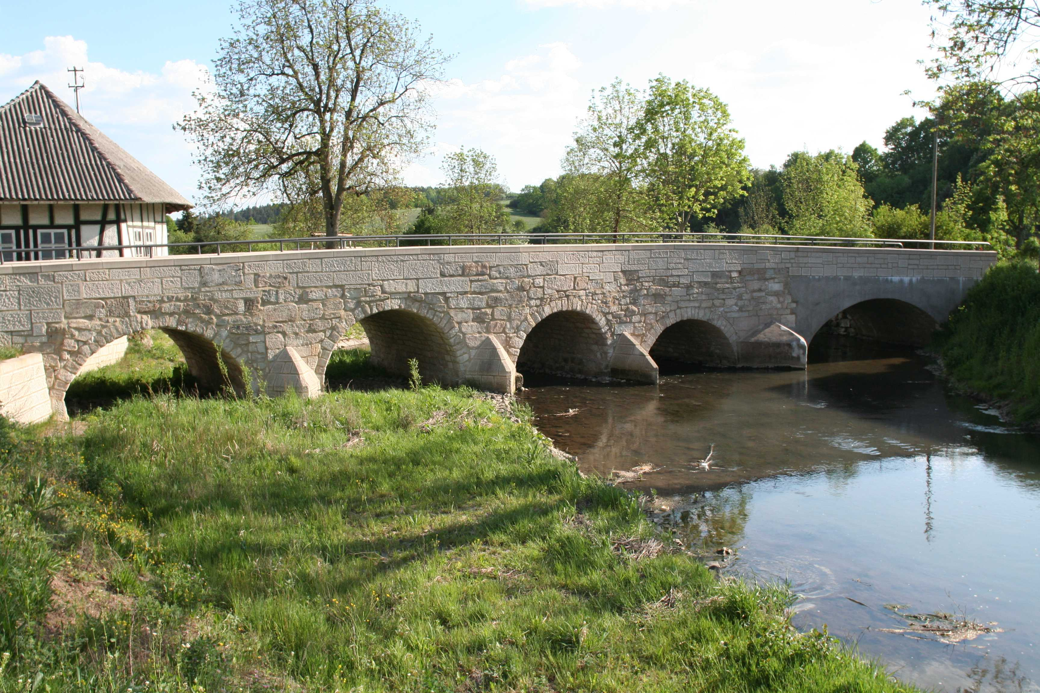 Rodachbrücke in Ummerstadt, erbaut 1565, Landkreis Hildburghausen